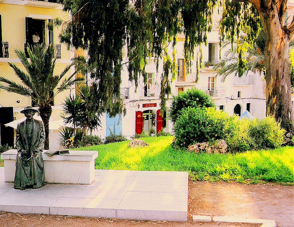 Se trata de adivinar el lugar de la fotografia. No contestes si no estás registrado en el juego!!!!. Si deseas contestar, únete primero! muchas gracias Nombre del personaje de la estatua y donde está ? Estátua del canonge Isidor Macabich a la ciutat d´Eivissa.- Isidor Macabich i Llobet (Eivissa 1883-Barcelona 1973). Historiador y eclesiástico. Su família procedía de Croacia. Estudió en el seminario de Eivissa, y el 1907 fué ordenado sacerdote. Canónigo archivero de Eivissa por oposición (1913), fundó el Centre d´Acció Social y, el 1919, la Federación Católico-Agraria de Eivissa. Interesado por la historia, desde 1903 colaboró en "Los archivos de Ibiza". El 1908 participó en el Primer Congreso de Historia de la Corona de Aragón, en Barcelona, con la ponencia "El feudalismo en Ibiza" (1909). Autor de monografías, como "Santa María la Mayor" (1916), "Pityusas". "Ciclo Púnico" (1931), "Ebusus". "Ciclo Romano" (1932) y "Santa María". "Ciclo Cristiano" (1934). En 1935 inició una "Historia de Ibiza" en fascículos. Muchos de estos trabajos fueron unidos y publicados dentro de la "Historia de Ibiza" (en cuatro volúmenes, 1966-67). También escribió poesias en la variante dialectal ibicenca, como "Dialectals" (1923), en catalán común y en castellano. Hizo reaparecer el "Diario de Ibiza" (1903), y fundó y dirigió "Nuestra Hoja" (1929-30). Colaboró en las publicaciones "El Debate", de Madrid, "Hispania", "Destino", "LLuc", etc. En 1951 fué nombrado canónigo-ardiaca de Eivissa, y en 1953, arcipreste.